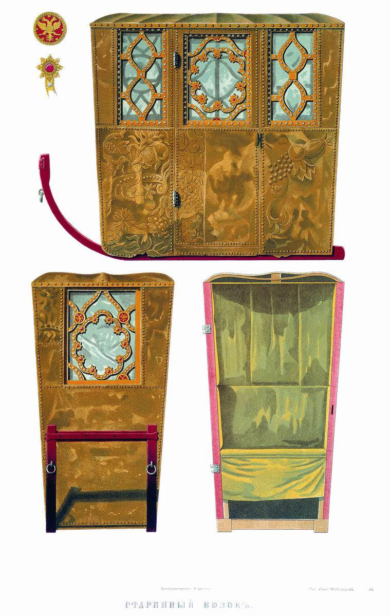 Старинный возок